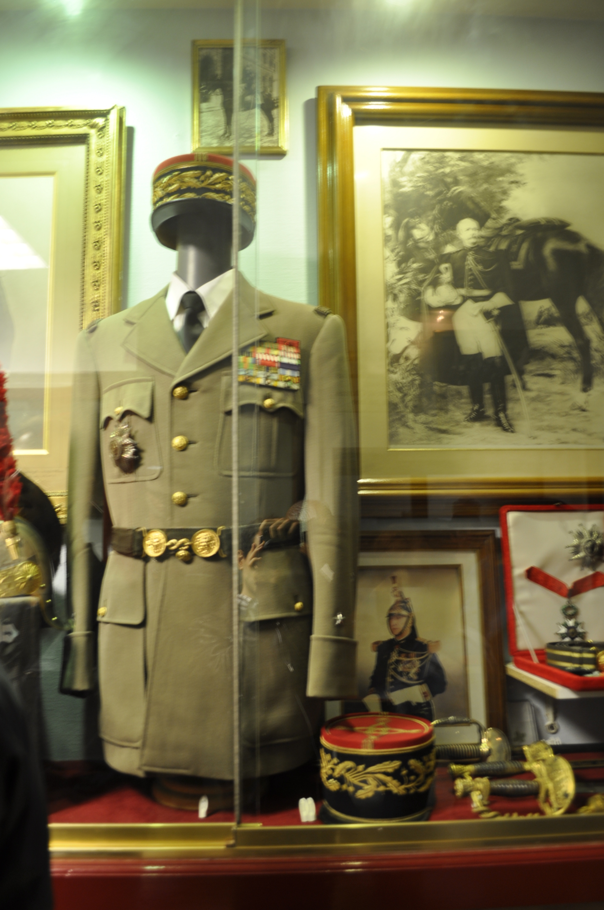 Salle des traditions du quartier des Célestins, ouvert à l'occasion des journées européennes du patrimoine 2015